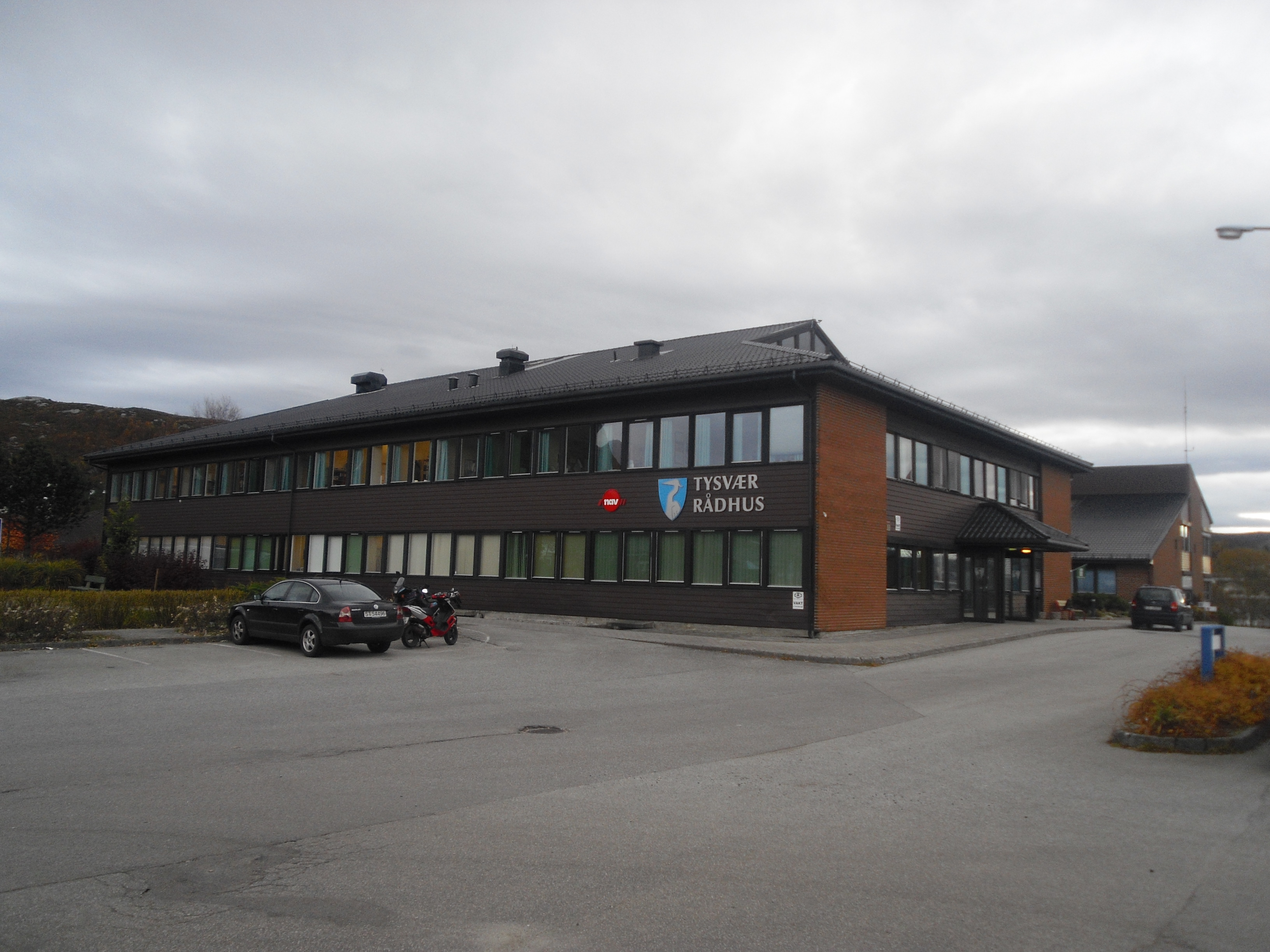 Rådhuset i Tysvær kommune på Aksdal